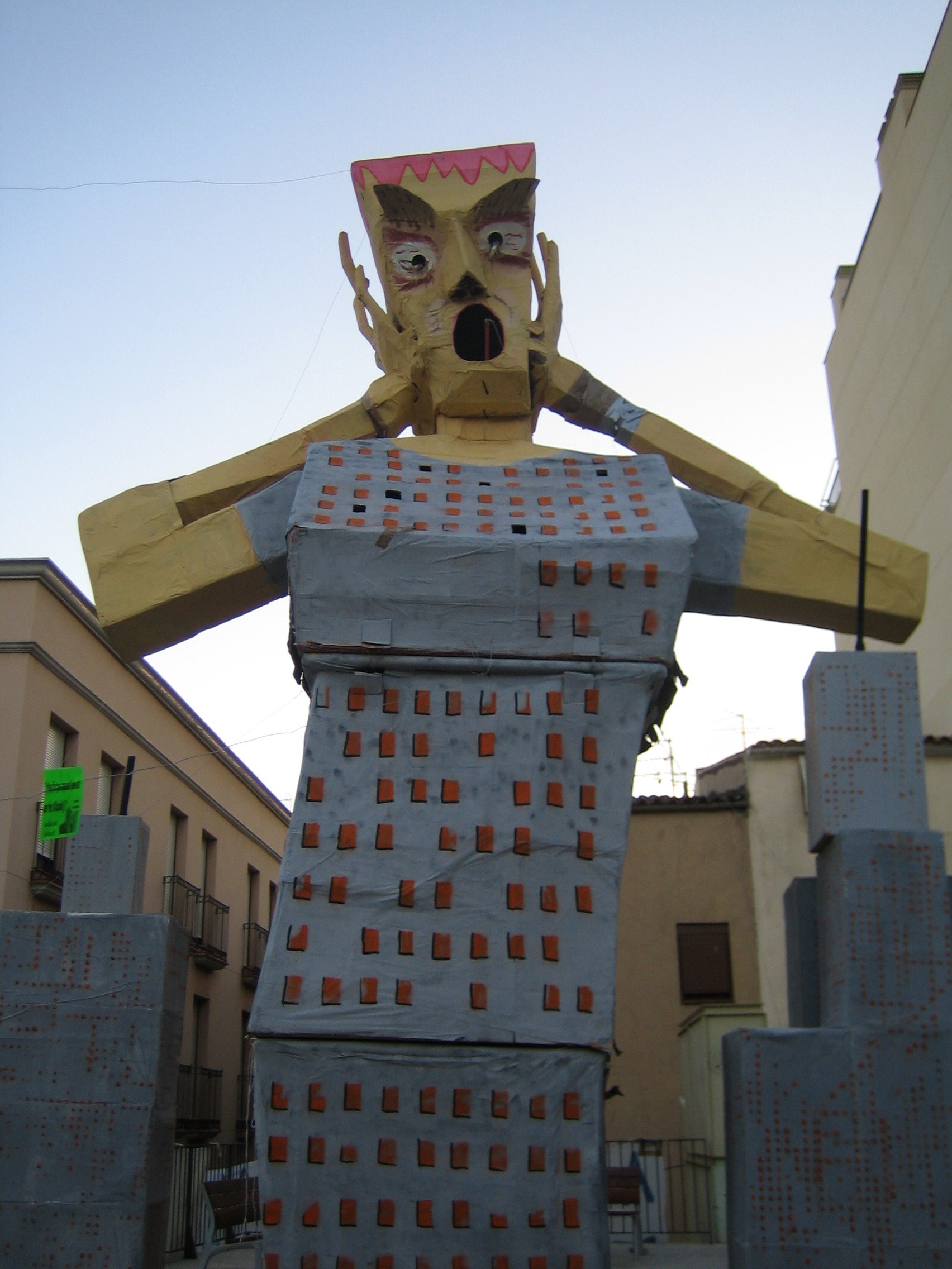 Falla realitzada en 2006 a la Festa Alternativa de Manresa